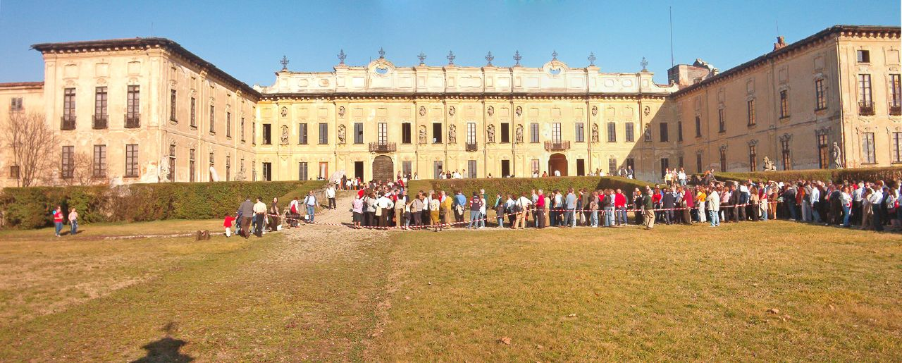 Visitatori in coda per la giornata di "Porte Aperte" di Villa Arconati a Castellazzo di Bollate (MI), il 20 marzo 2005.